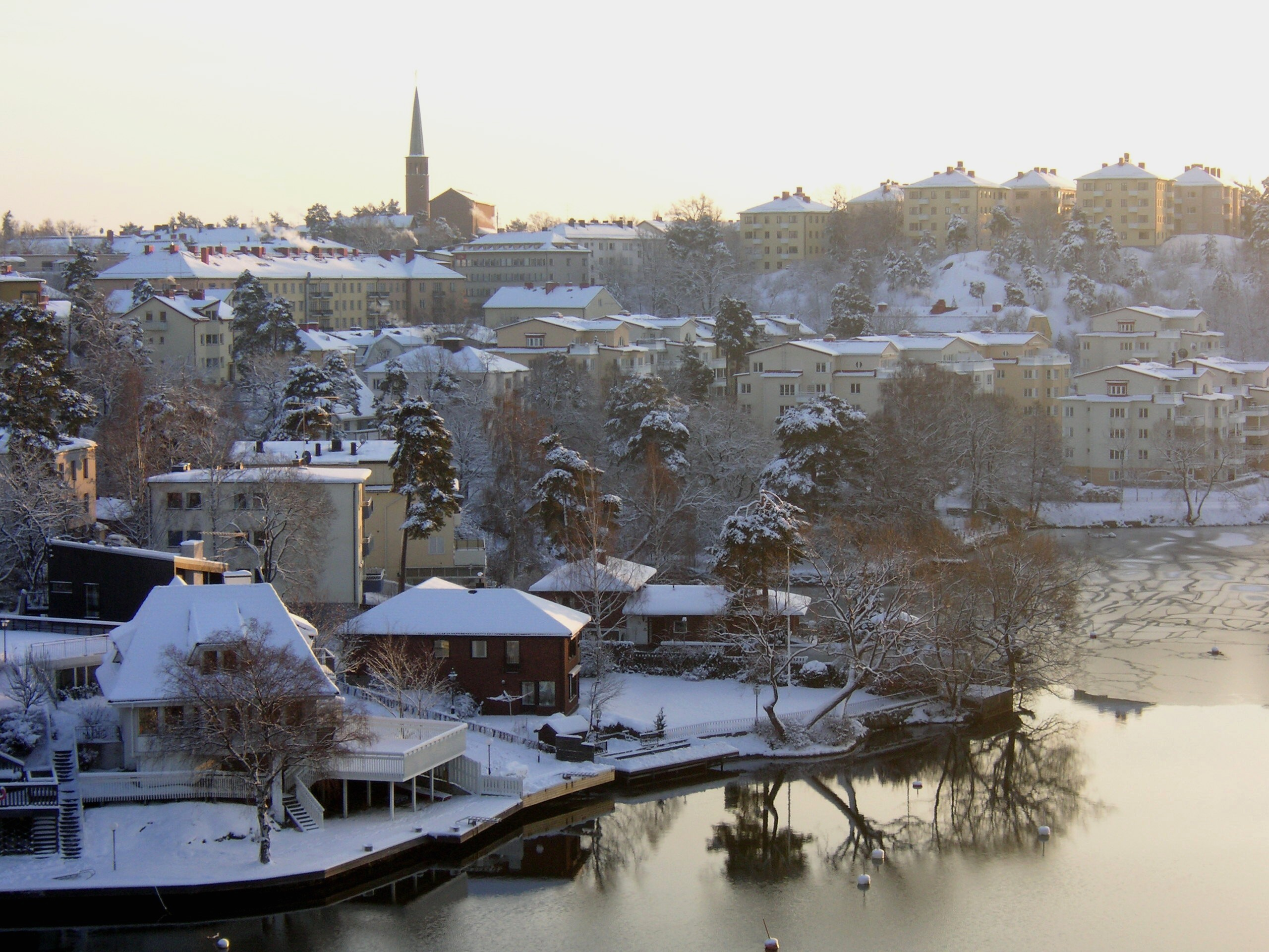 Blick från Alviksbron över Stora Essingen vintertid